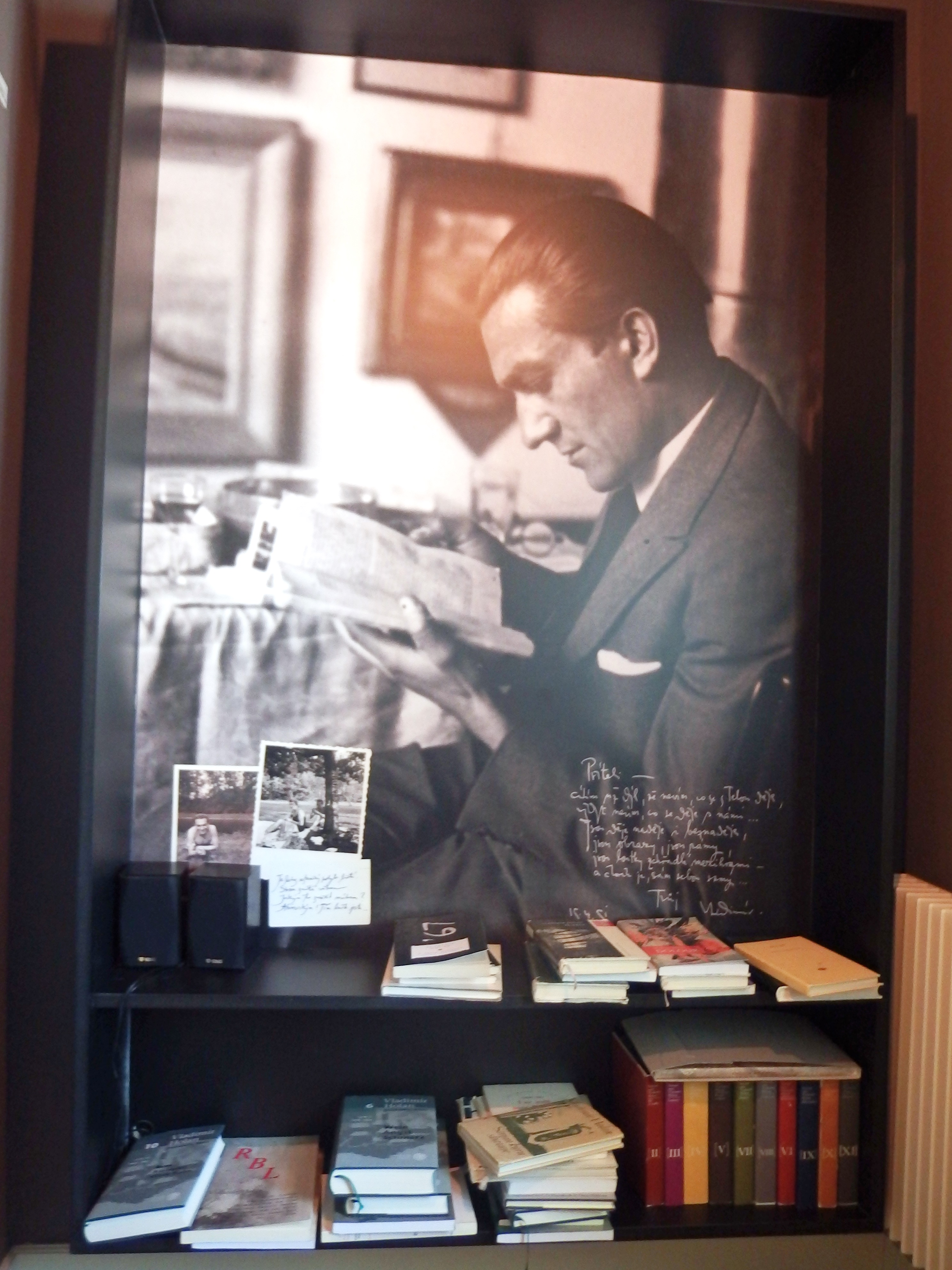 Werichova vila, U Sovových mlýnů 501/7, Praha-Malá Strana. Museum Kampa, stálá expozice, sklepní expozice a klubová zóna.